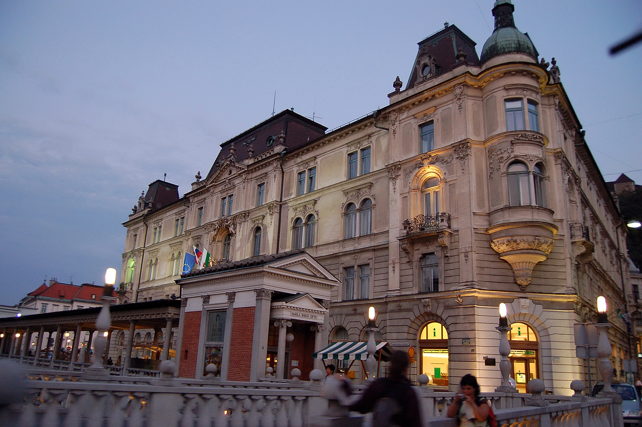 Ljubljana, Slovenia